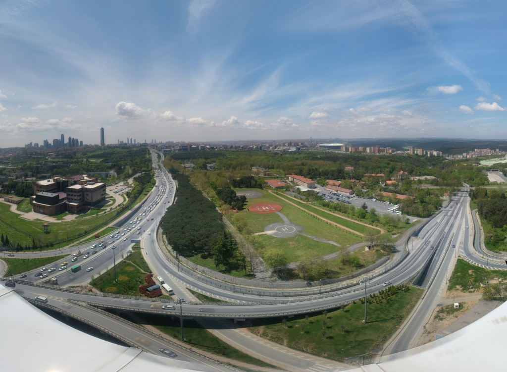 Türk Telekom Arena